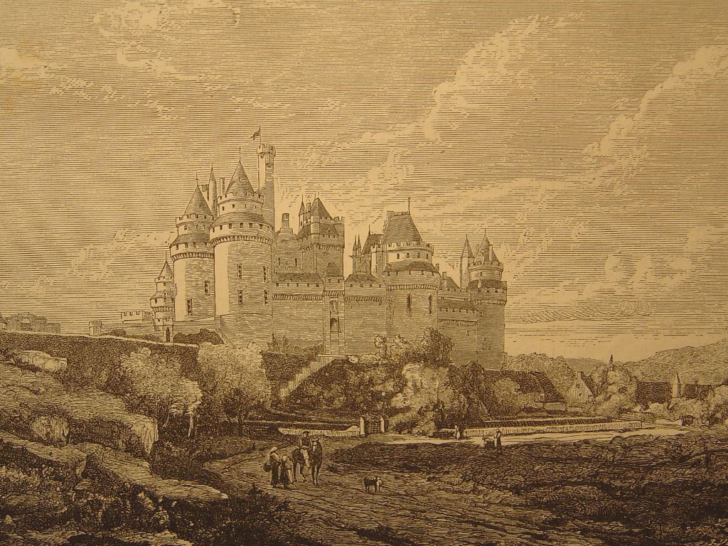 Château de Pierrefonds